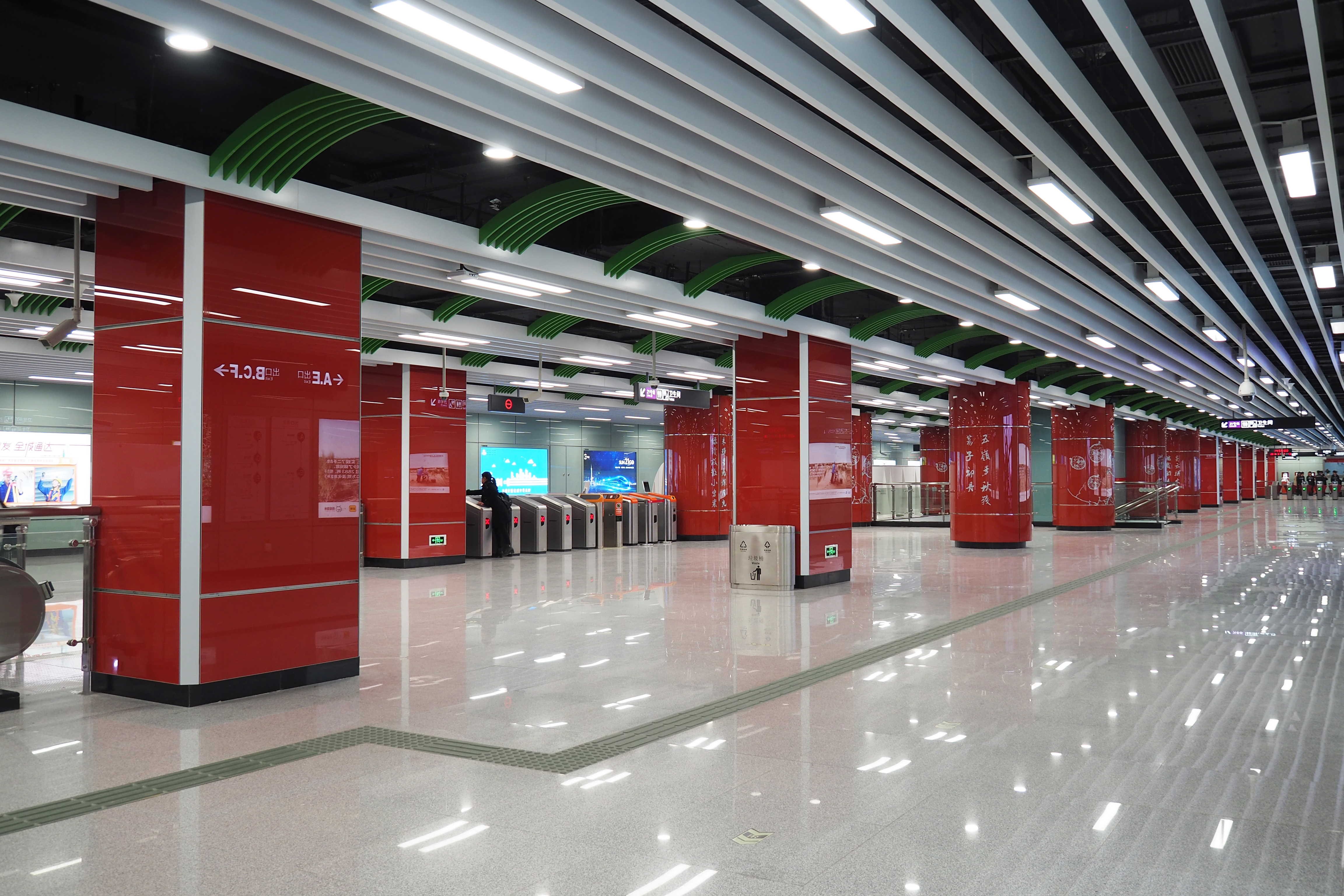 中文（中国大陆）: 广州地铁21号线增城广场站站厅。